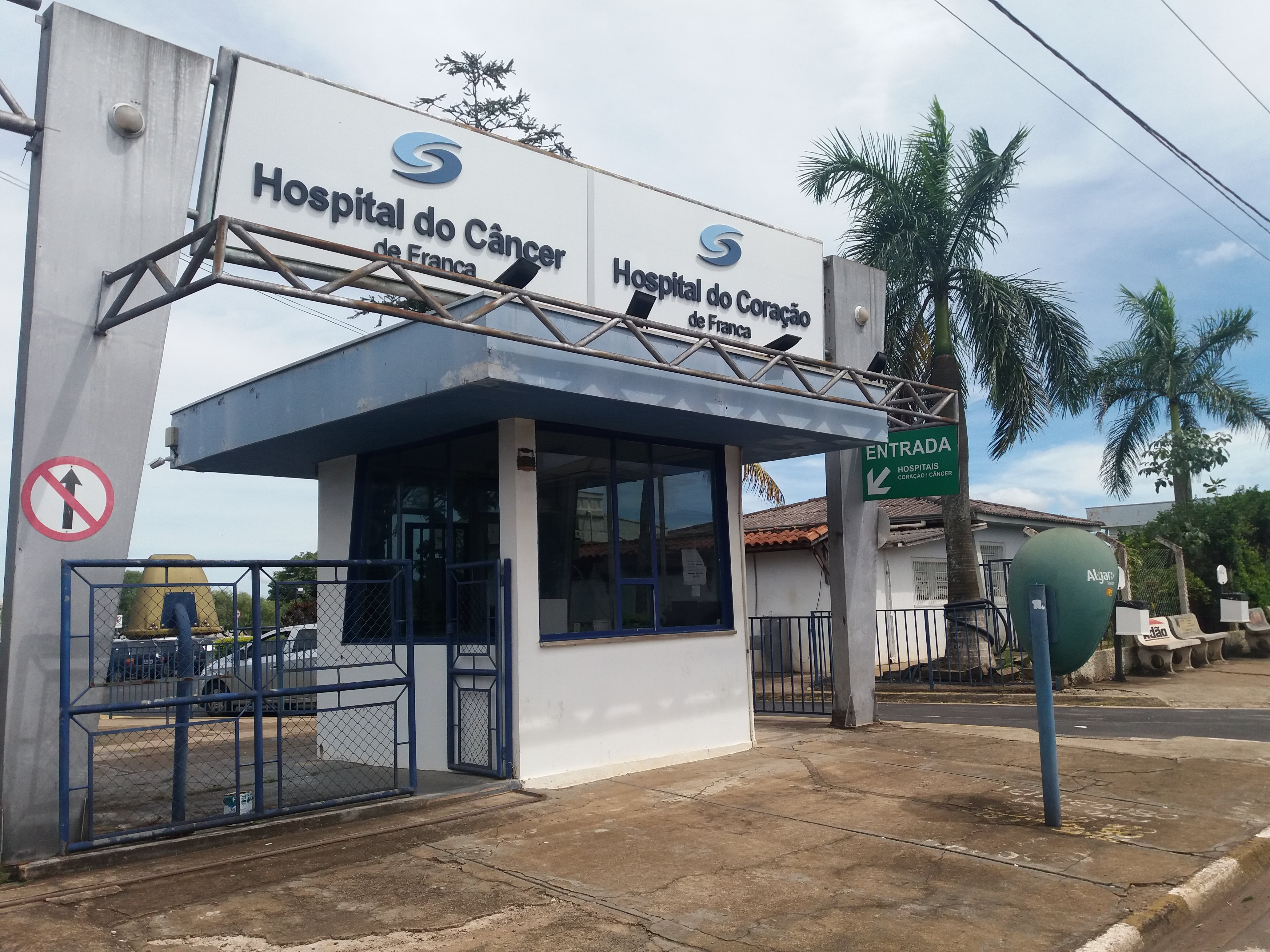 Entrada do Hospital do Coração e do Hospital do Câncer, Franca (SP), Brazil